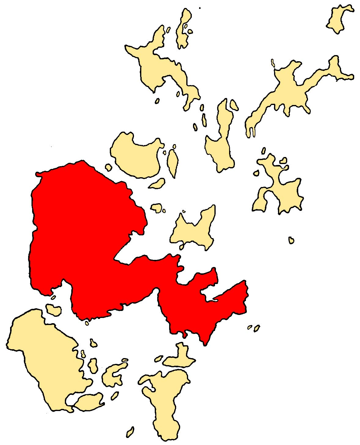 Mainland Orkney